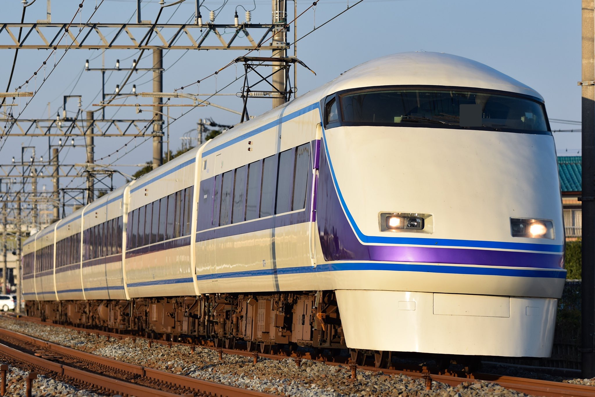 東武100系107編成(雅スペーシア)